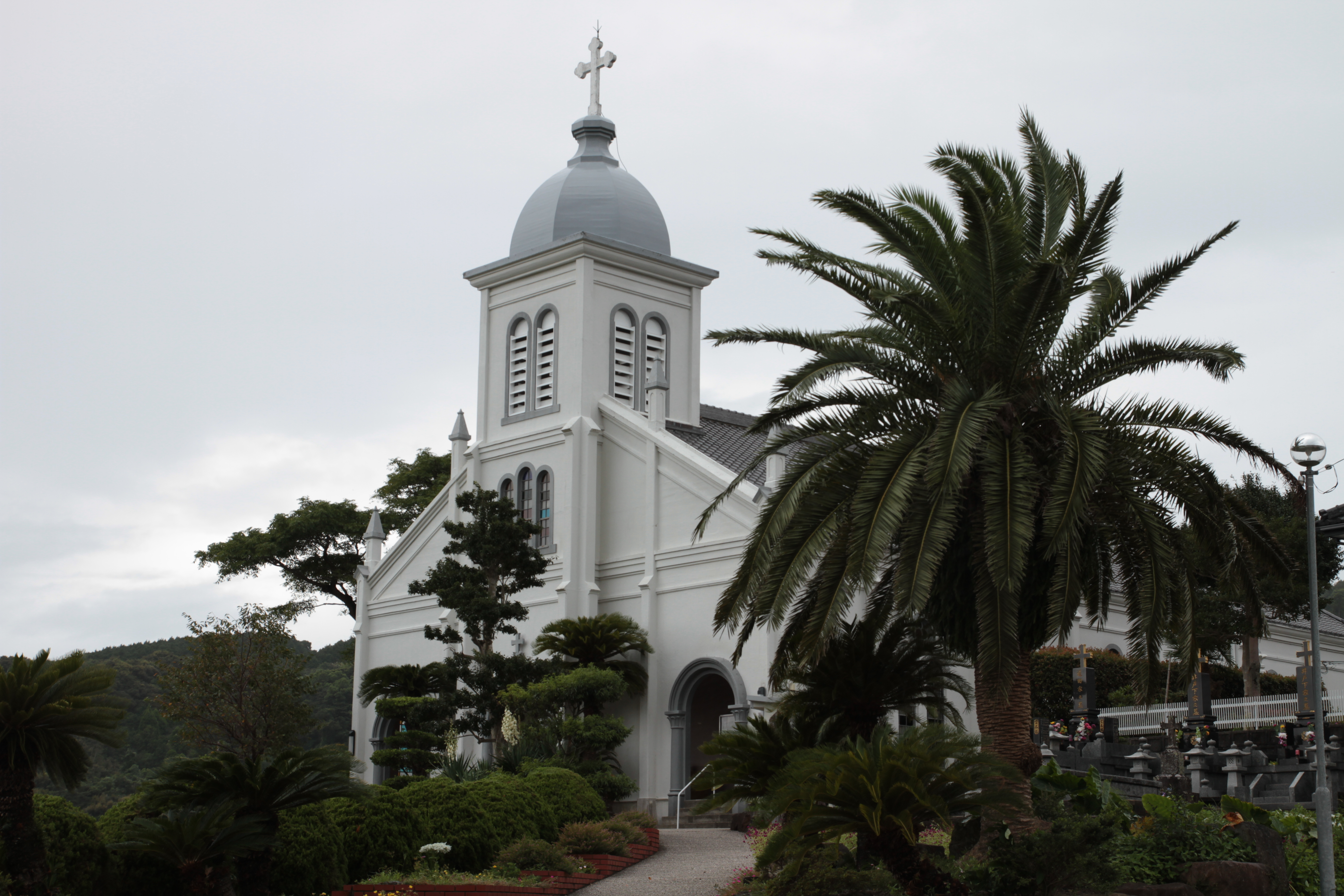 大江教会